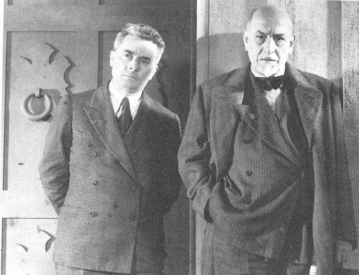 Pirandello e Bontempelli visitano gli studi cinematografici della Lumitor.